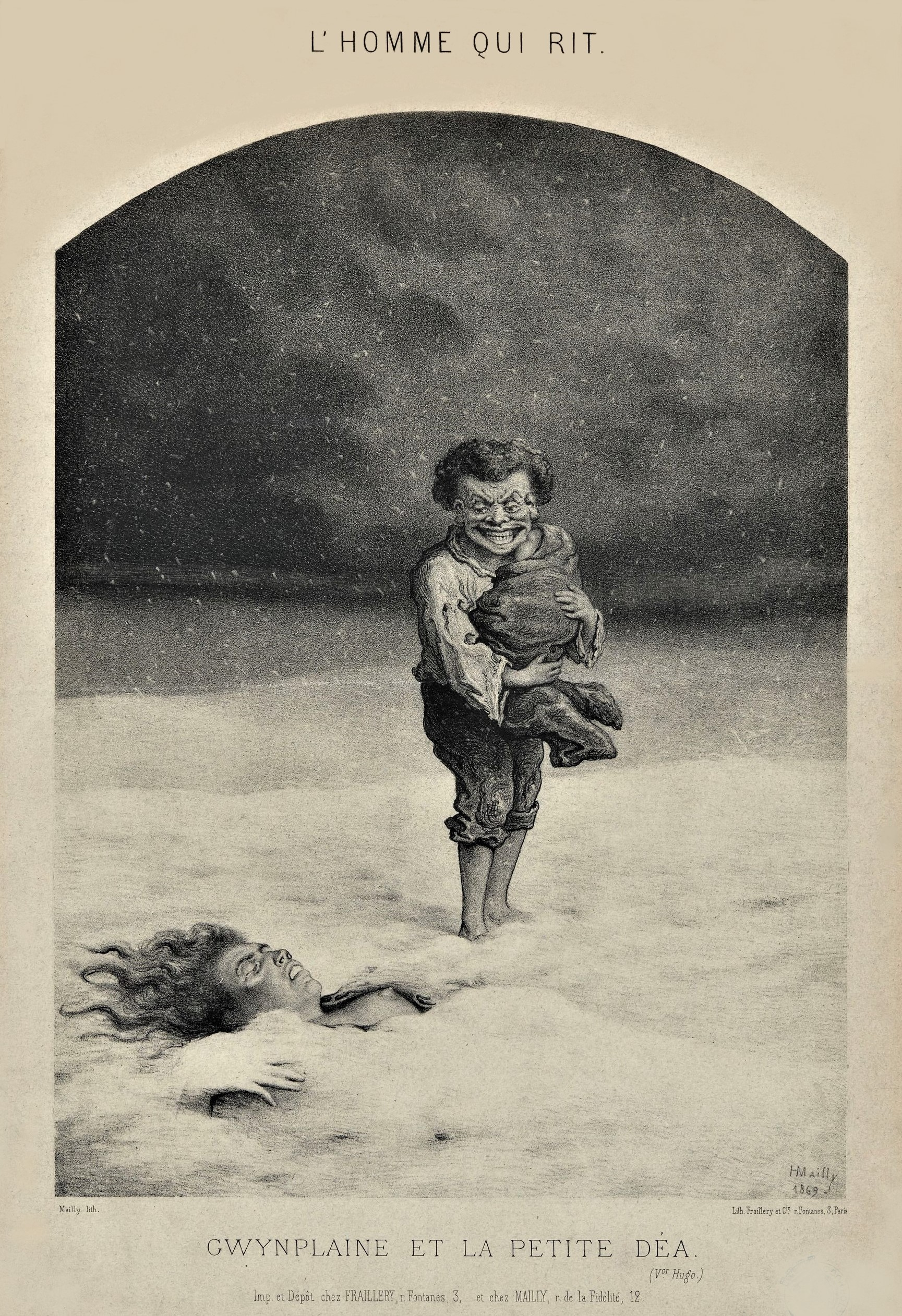 Gwynplaine et la petite Dea, illustration d'Hippolyte Mailly pour L'Homme qui rit de Victor Hugo, lithographie Fraillery et Cie, 1869.